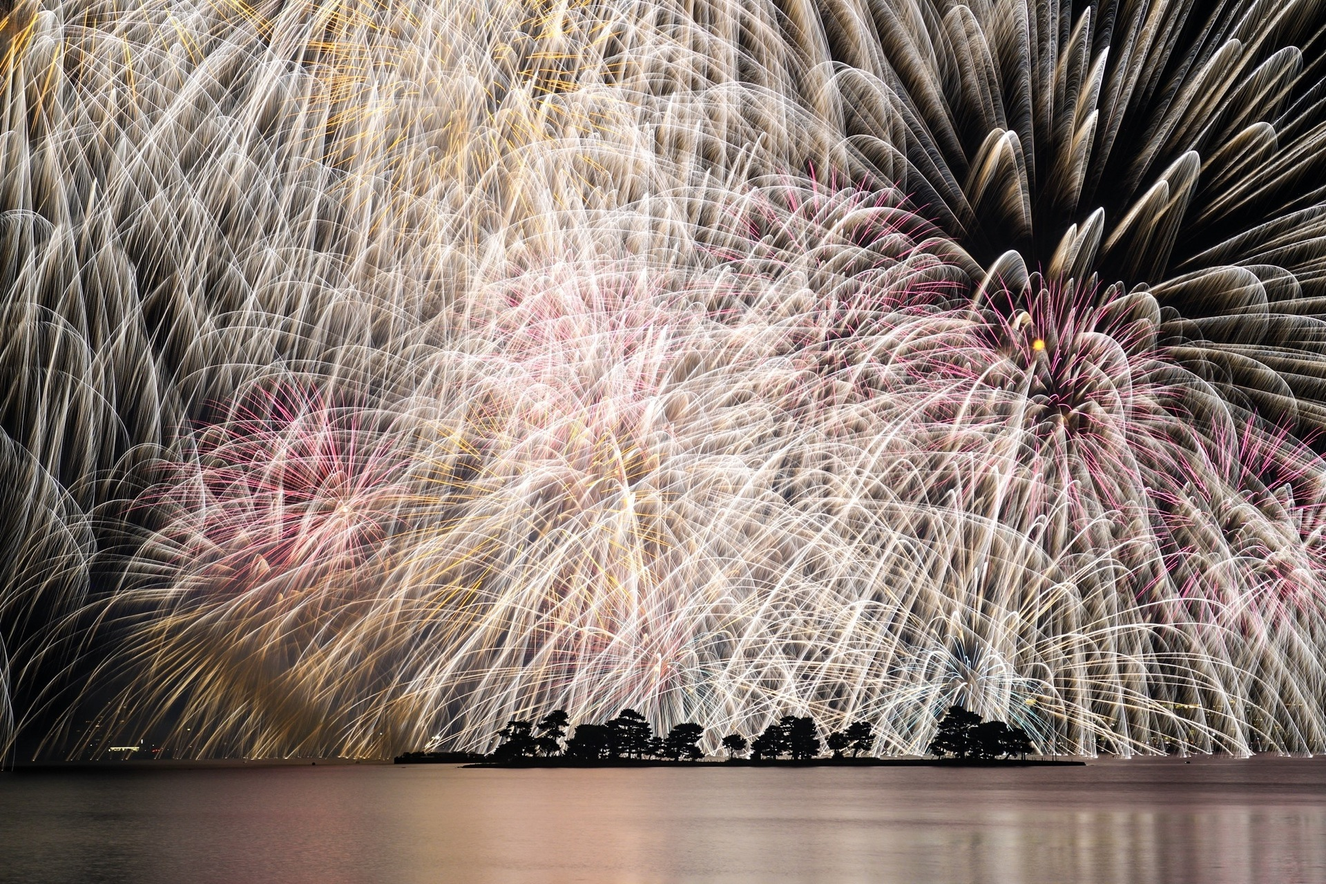 「島根県 松江水郷祭 大輪」FIND/47プロジェクトより